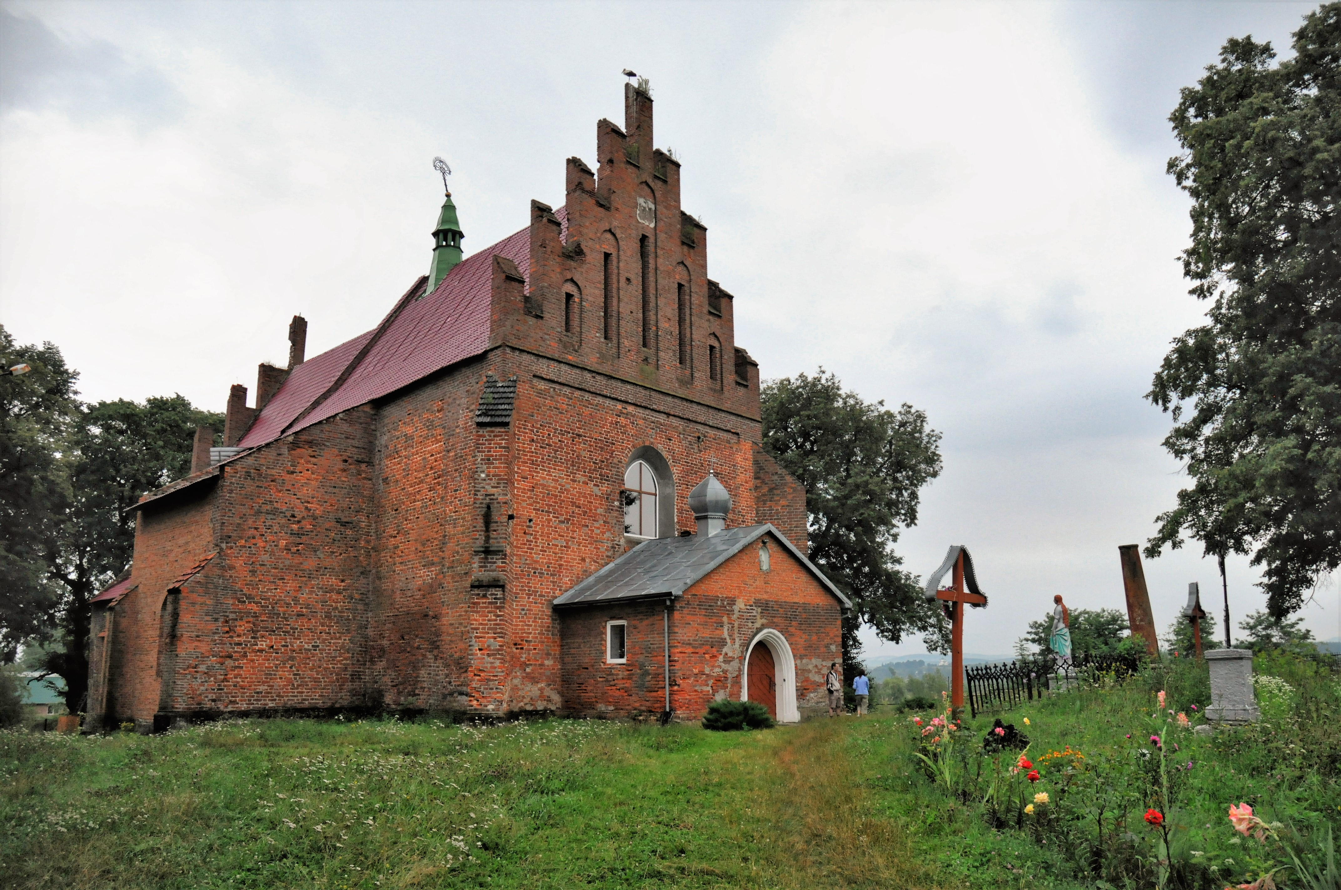 Скелівка (кол.Фельштин), Костел святого Мартина